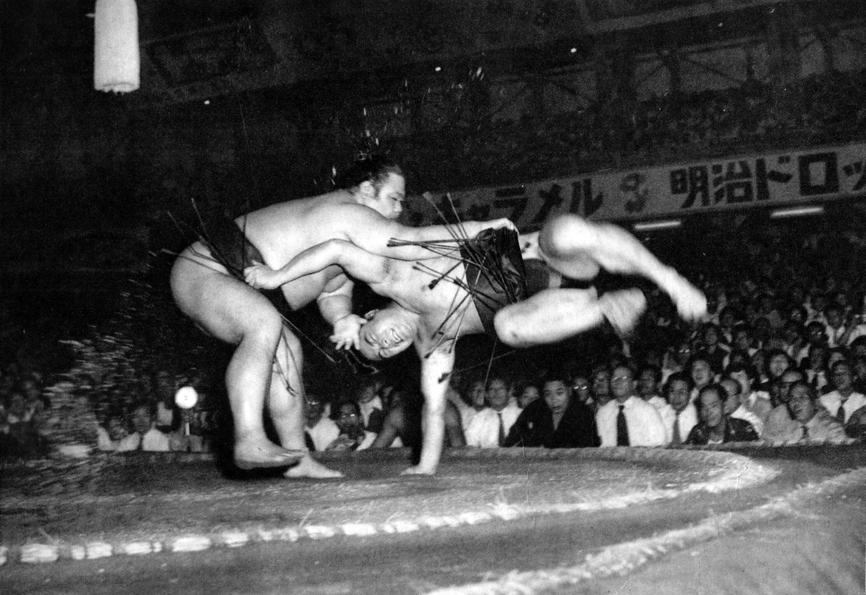 昭和28年（1953年）秋場所11日目、東富士の上手投げで、栃錦が横転した瞬間。蔵前国技館にて撮影。